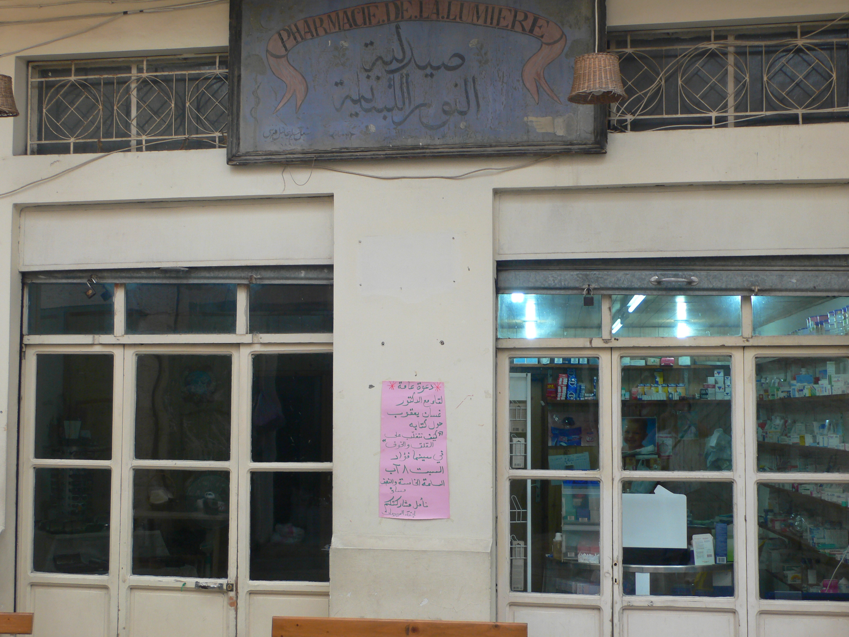 Douma, devanture de pharmacie dans la rue principale